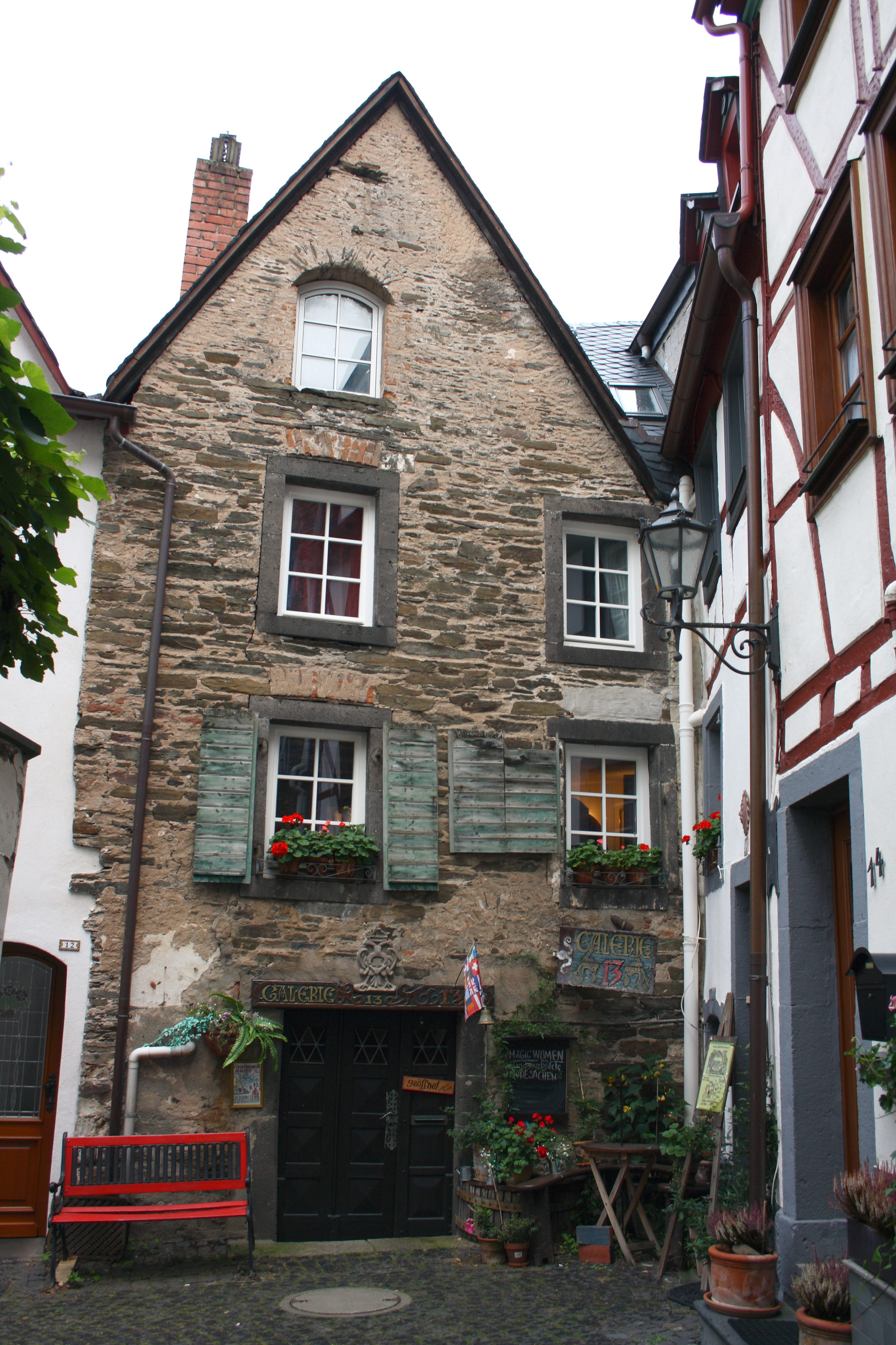 ehemalige Synagoge, Weingasse 13, in Beilstein im Landkreis Cochem-Zell (Rheinland-Pfalz)